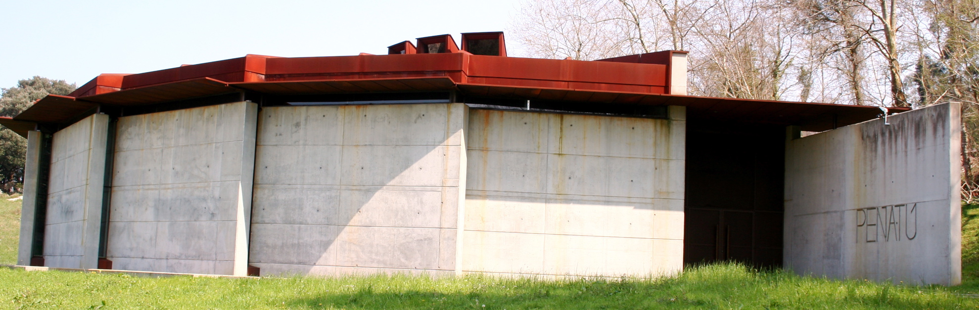 Aula de interpretación de Peña Tú